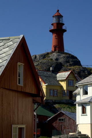 Ona fyr, Ona, Norway